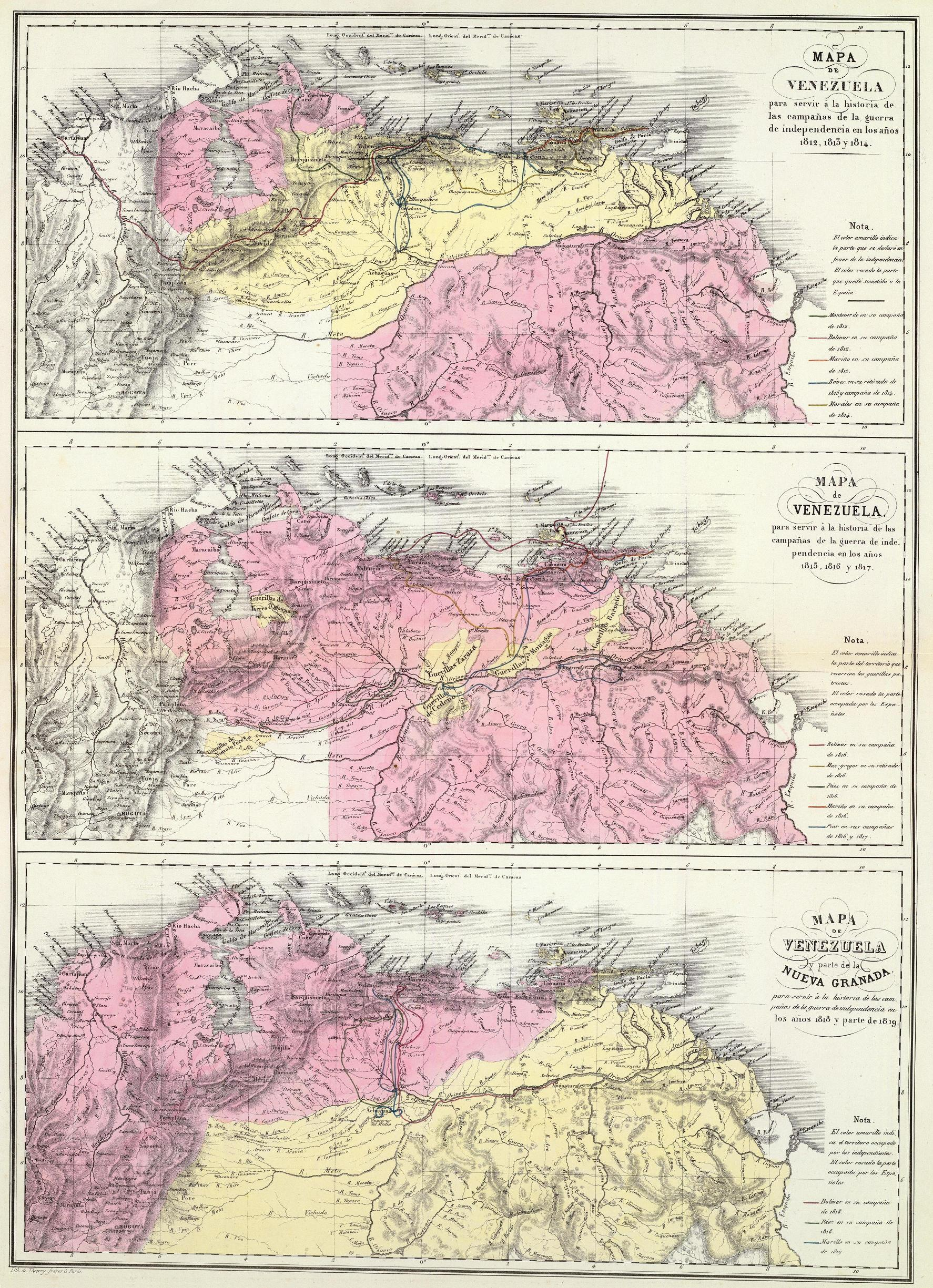 Mapa de Venezuela para servir a la historia de las campañas de independencia 1813 - 1819. Mapa de Venezuela durante la guerra de independencia desde 1812 hasta 1819 del Atlas de Venezuela (1840) de Agustin Codazzi. Los territorios en lila representan los controlados por los españoles y los territorios en amarillo los controlados por los venezolanos. El primer cuadrante de arriba abajo representa los años 1812, 1813 y 1814. El de en medio los años 1815, 1816 y 1817. El de abajo los años 1818 y parte de 1819